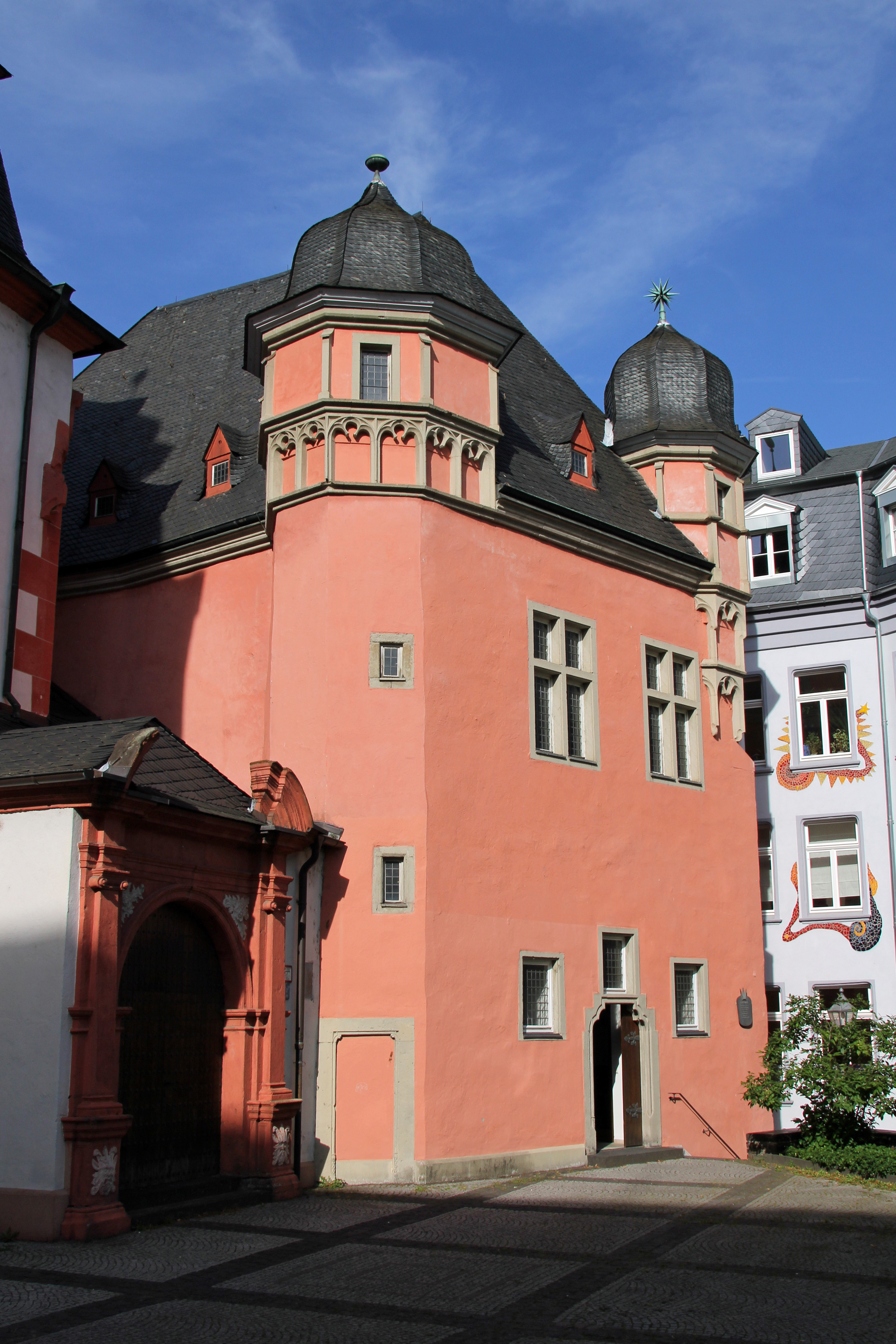 Koblenz im Buga-Jahr 2011 - Das Schöffenhaus